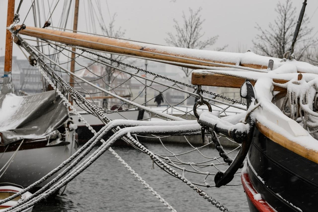 Klüverbaum und Bugnetz eines Kutters im Winter